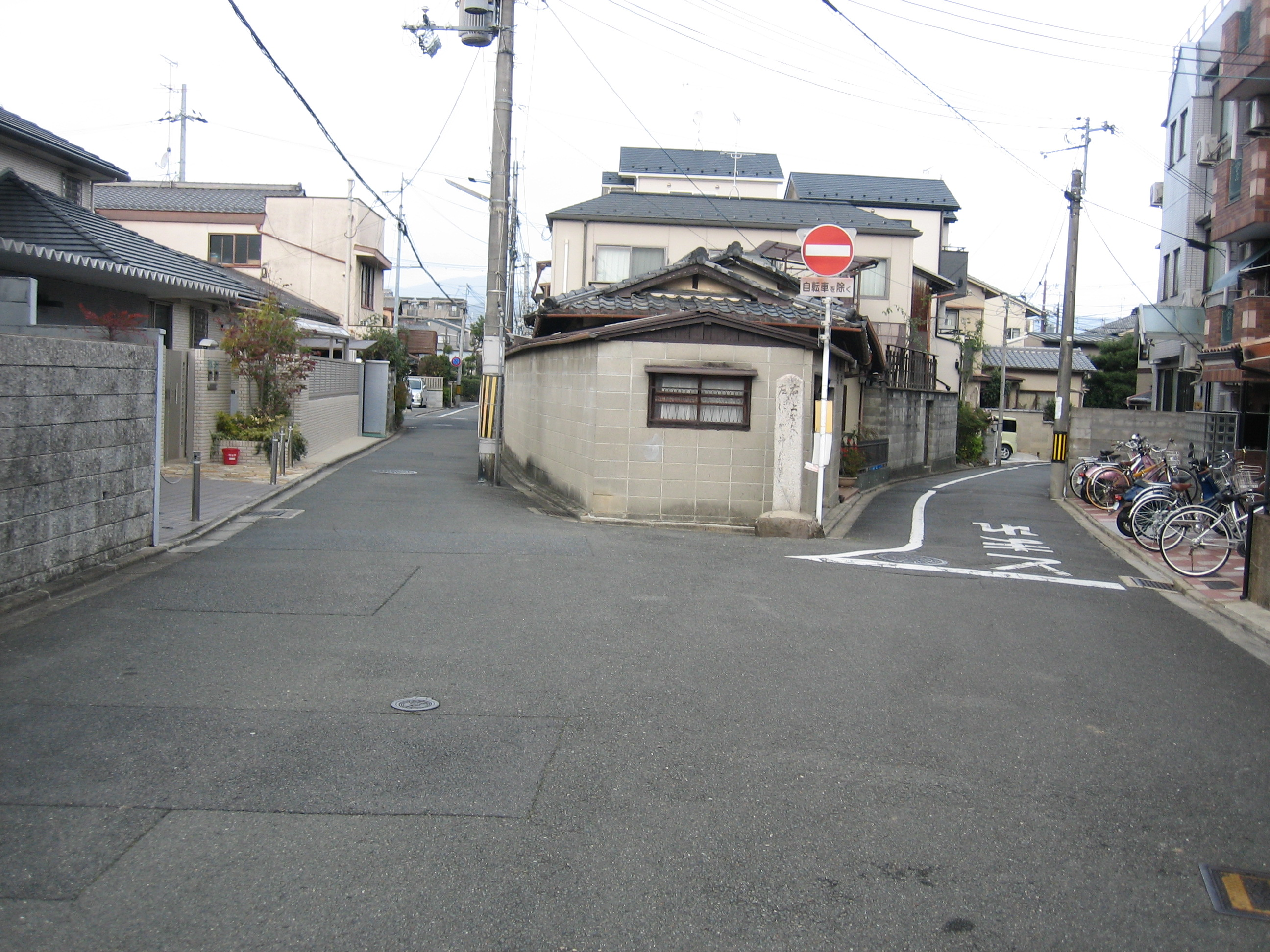 大徳寺通を京都市北区紫竹下竹殿町で撮影